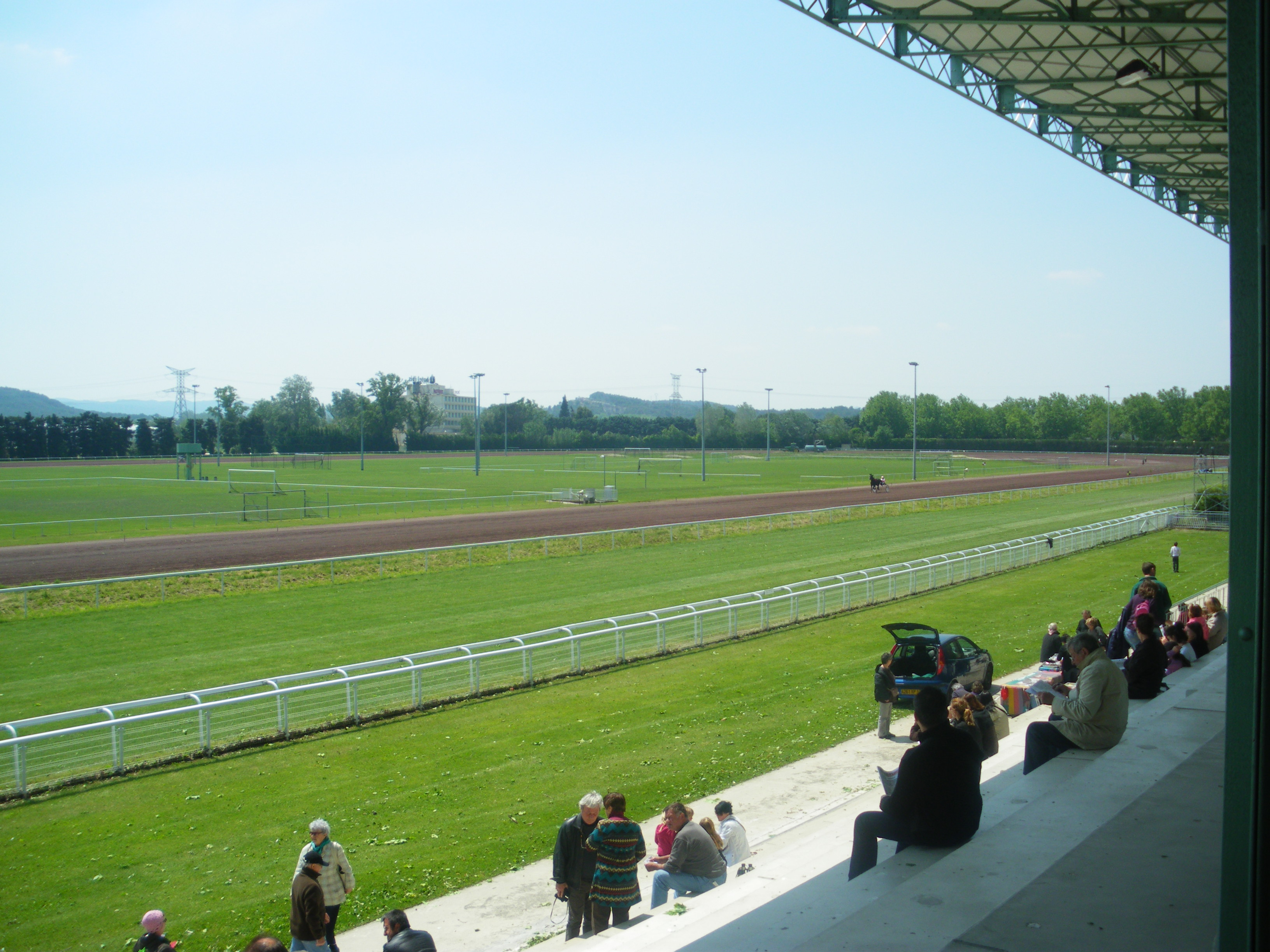 Hippodrome de la Durance, Cavaillon, Vaucluse